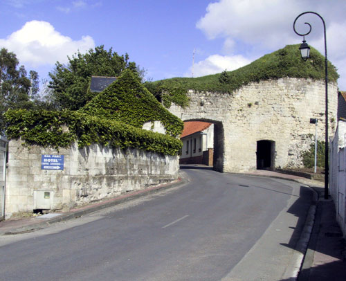 le reste des fortifications de Tournehem